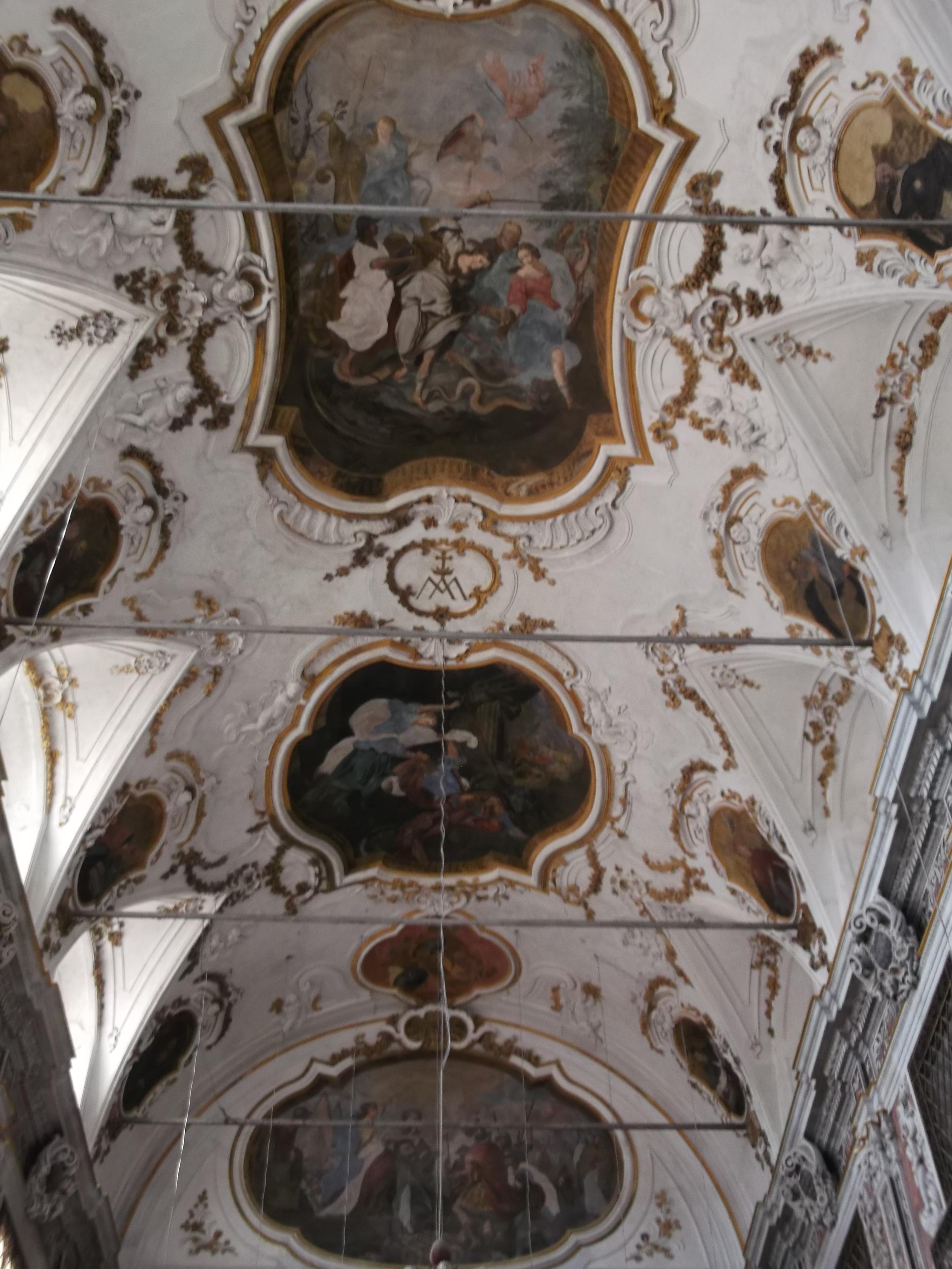 Volta a botte affrescata da Olivio Sozzi nel 1738.